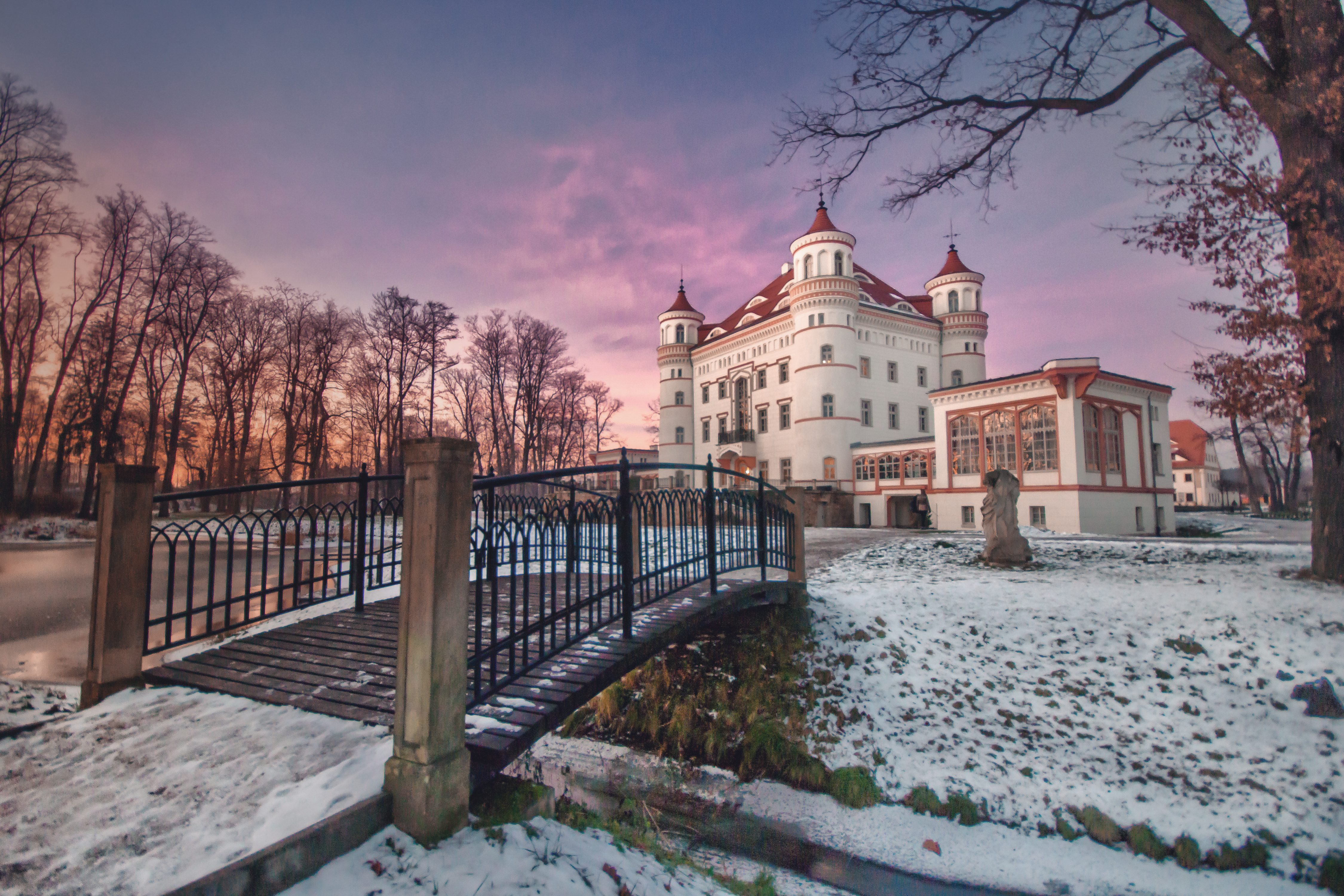 Wojanów, Pałac w Wojanowie Wikidata has entry Q11815054 with data related to this item.